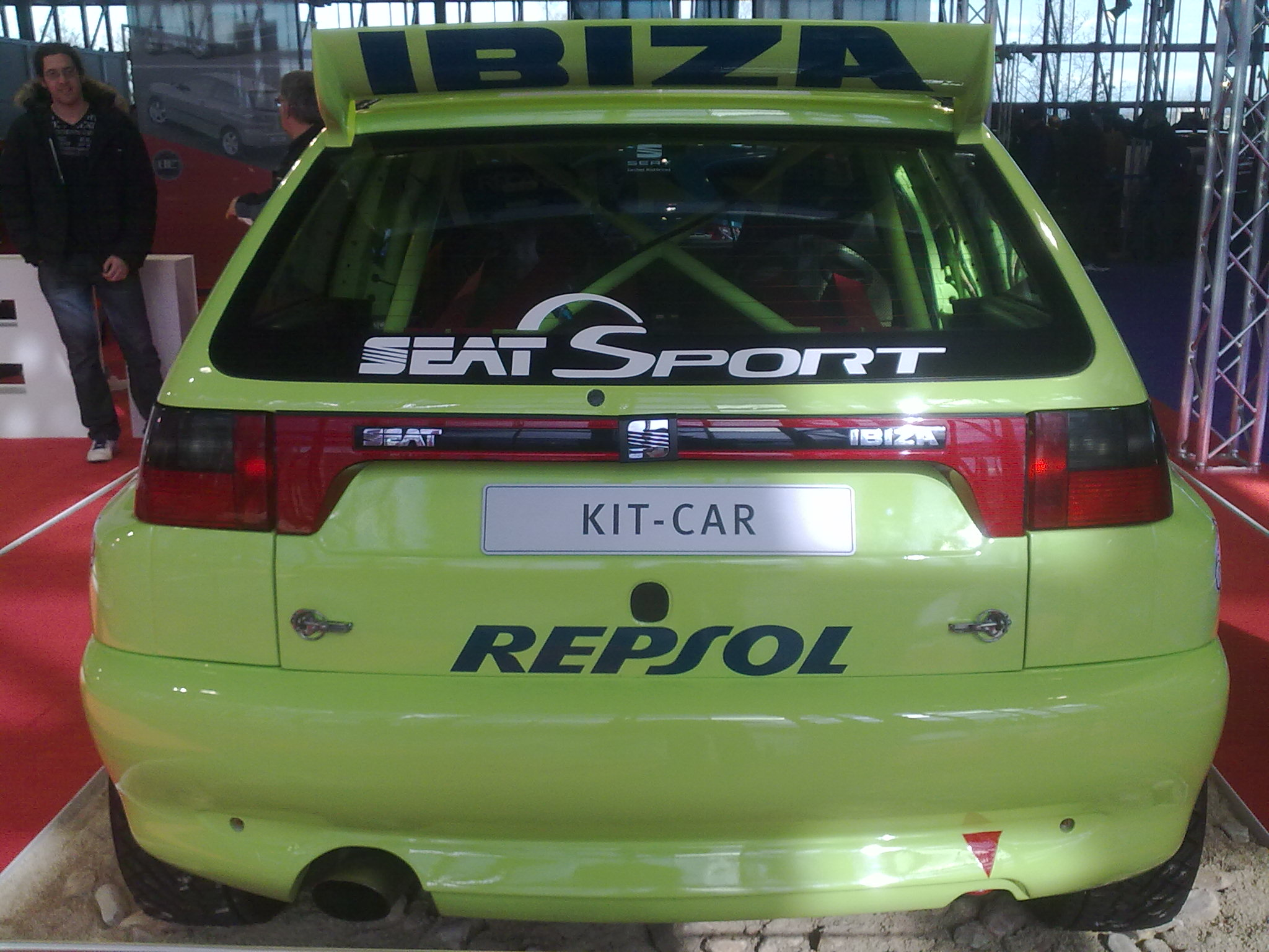 Retro clásica Madrid 2014 , 30 aniversario del SEAT